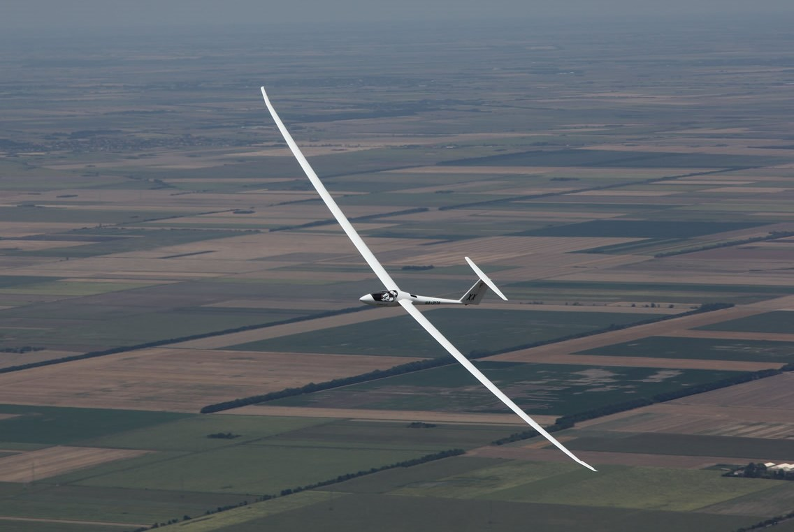 Hegedűs László az 58. Magyar Nemzeti Vitorlázórepülő Bajnokság 11. versanynapján